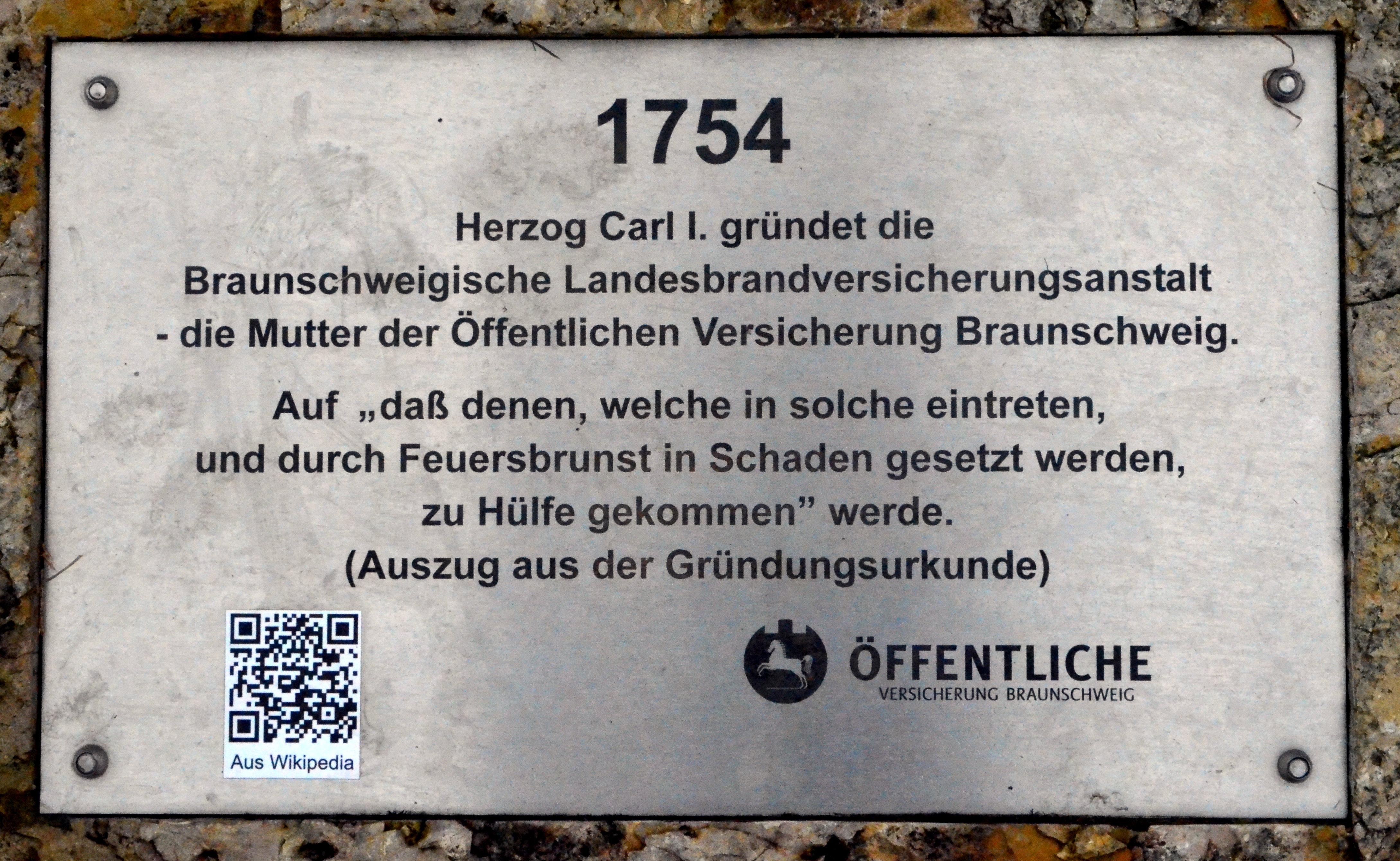 QRpedia-QR-Code auf einem Stein des „Zeitpfades“ bei der Königspfalz Werla in Niedersachsen. Auf dem „Pfad“ sind ca. ein Dutzend QRCs von Wikipedia-Artikeln angebracht (von 926 [Ersterwähnung der Pfalz Werla durch Widukind von Corvey] bis in die Gegenwart). 1754 gründete Karl I, Herzog von Braunschweig-Lüneburg, die „Landesbrandversicherungsanstalt“, die Vorläuferin der Öffentlichen Versicherung Braunschweig.